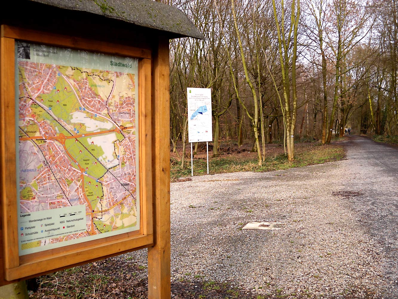 Wald Benrath, Forst Benrath, лес Бенрат.